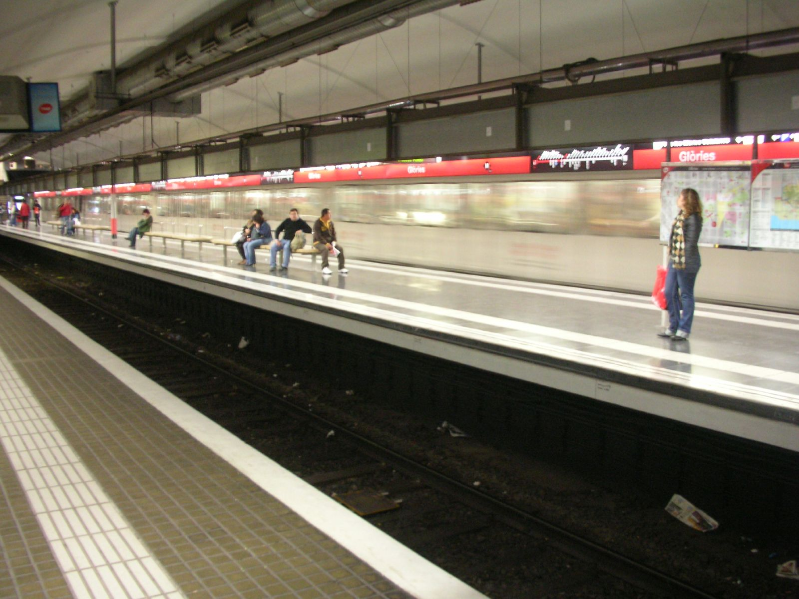 Andana direcció Fondo de la línia 1.